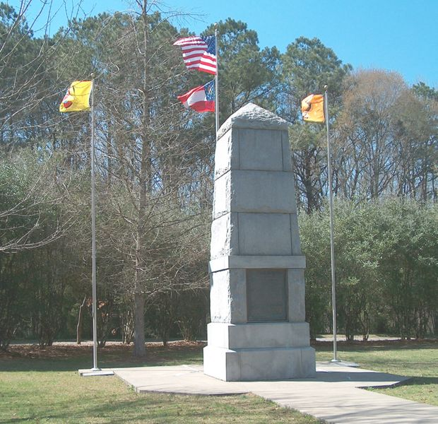 The picture was taken by Cculber007 at New Echota Historic Site The monument on New Echota Historic Site honored the Cherokees who died on the Trail of Tears. (Zdjęcie wykonane w Miejscu Historycznym New Echota, Georgia, USA, ukazuje pomnik poświęcony ofiarom tzw. "Szlaku Łez" - przymusowego wysiedlenia Indian Czirokezów na Terytorium Indiańskie)